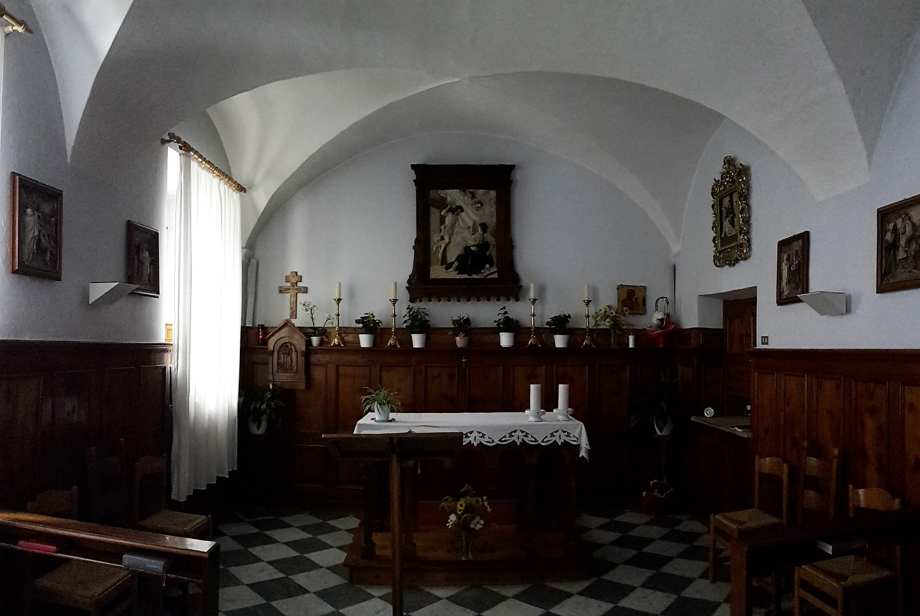 Santuario di Pietralba - Interno cappella Pellegrino Laziosi